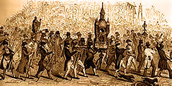 Défilé compagnonnique. Journal L’Illustration, novembre 1845.